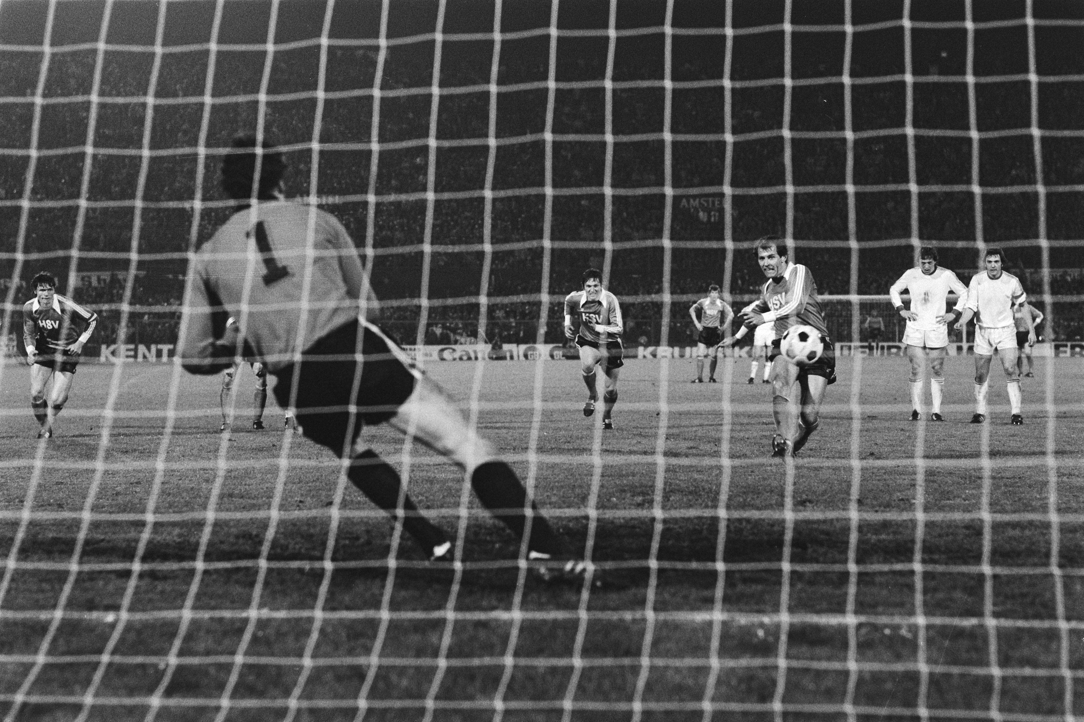 Collectie / Archief : Fotocollectie Anefo Reportage / Serie : [ onbekend ] Beschrijving : Anderlecht tegen HSV (finale Europa Cup II ); Georg Volkert (HSV) brengt uit een strafschop de stand op 1-0 Datum : 11 mei 1977 Locatie : Amsterdam Trefwoorden : sport, voetbal Persoonsnaam : Volkert, Georg Fotograaf : Peters, Hans / Anefo Auteursrechthebbende : Nationaal Archief Materiaalsoort : Negatief (zwart/wit) Nummer archiefinventaris : bekijk toegang 2.24.01.05 Bestanddeelnummer : 929-1735